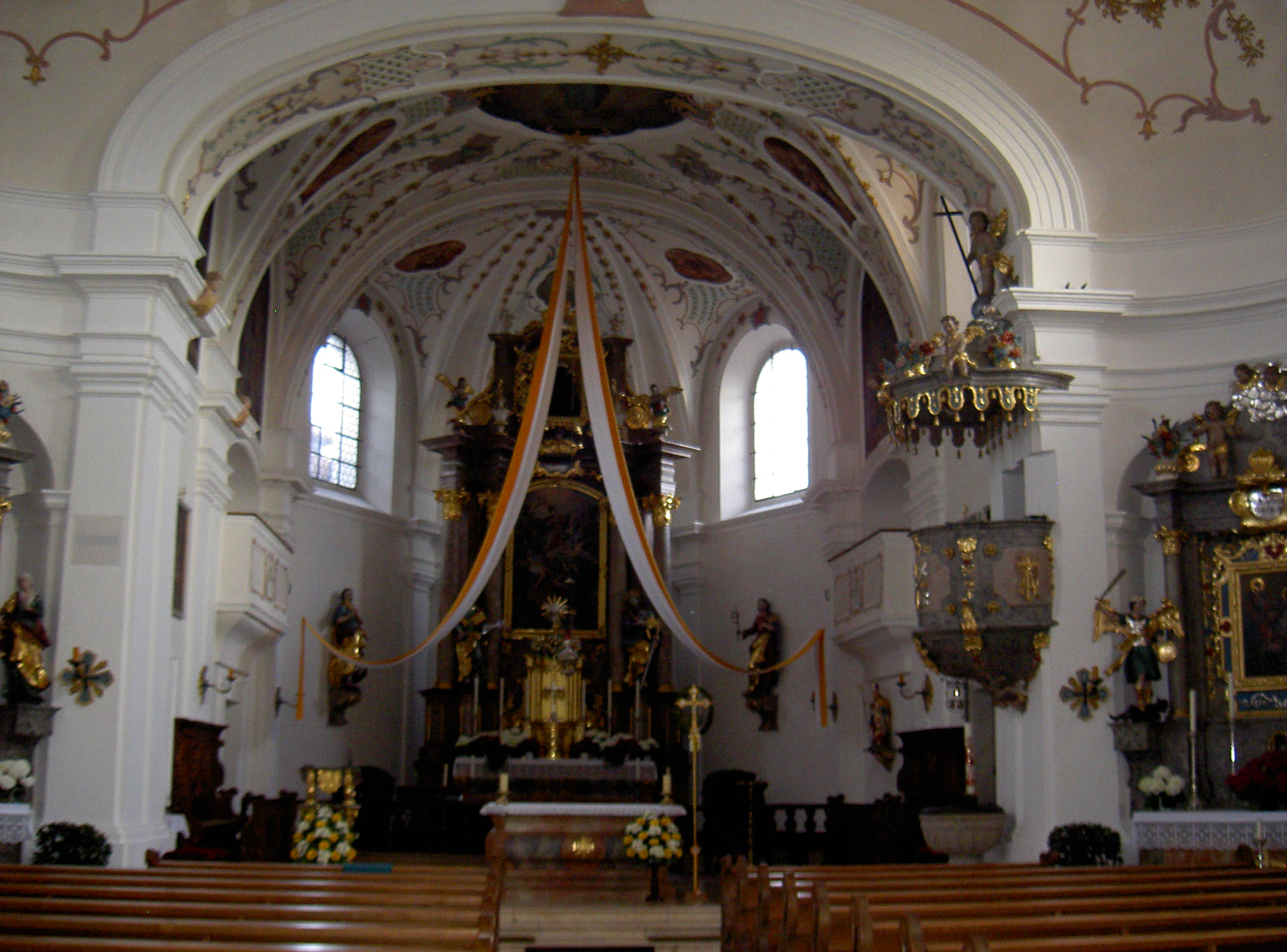 Innenausstattung von St. Georg in Neustadt an der Waldnaab